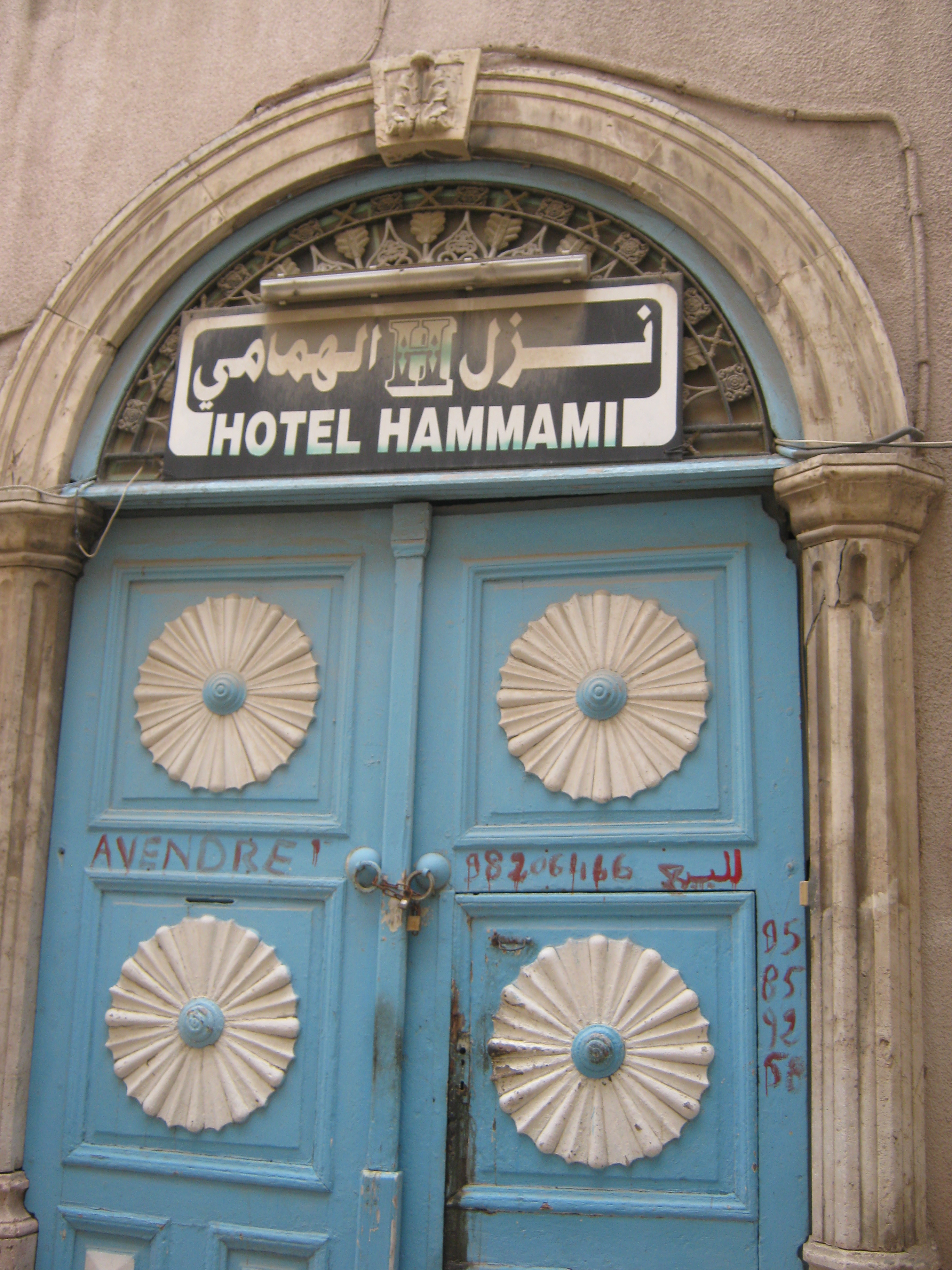 Palais Nessim Samama à Tunis